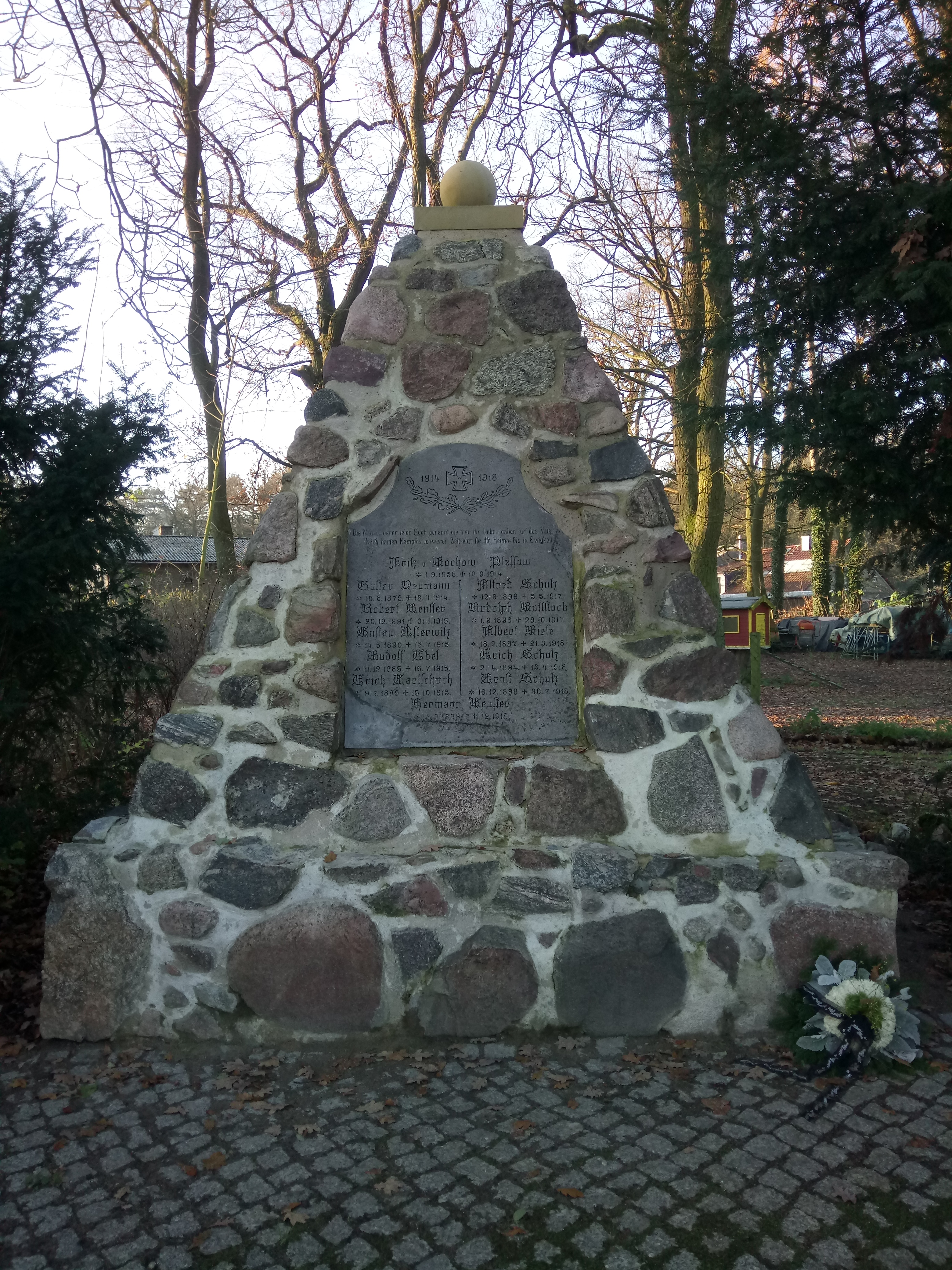 Das Denkmal wurde in den 1920er Jahren errichtet und besteht aus Feldsteinen. Ein genaues Datum ist unbekannt. Auf einer Tafel eingestanzt sind die Namen von im Ersten Weltkrieg gefallenen Soldaten aus Kammerode.